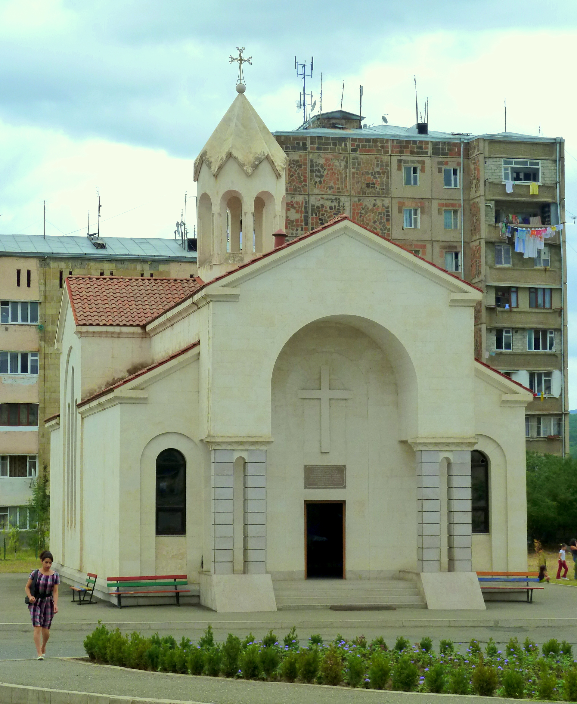 Новая церковь, Степанакерт